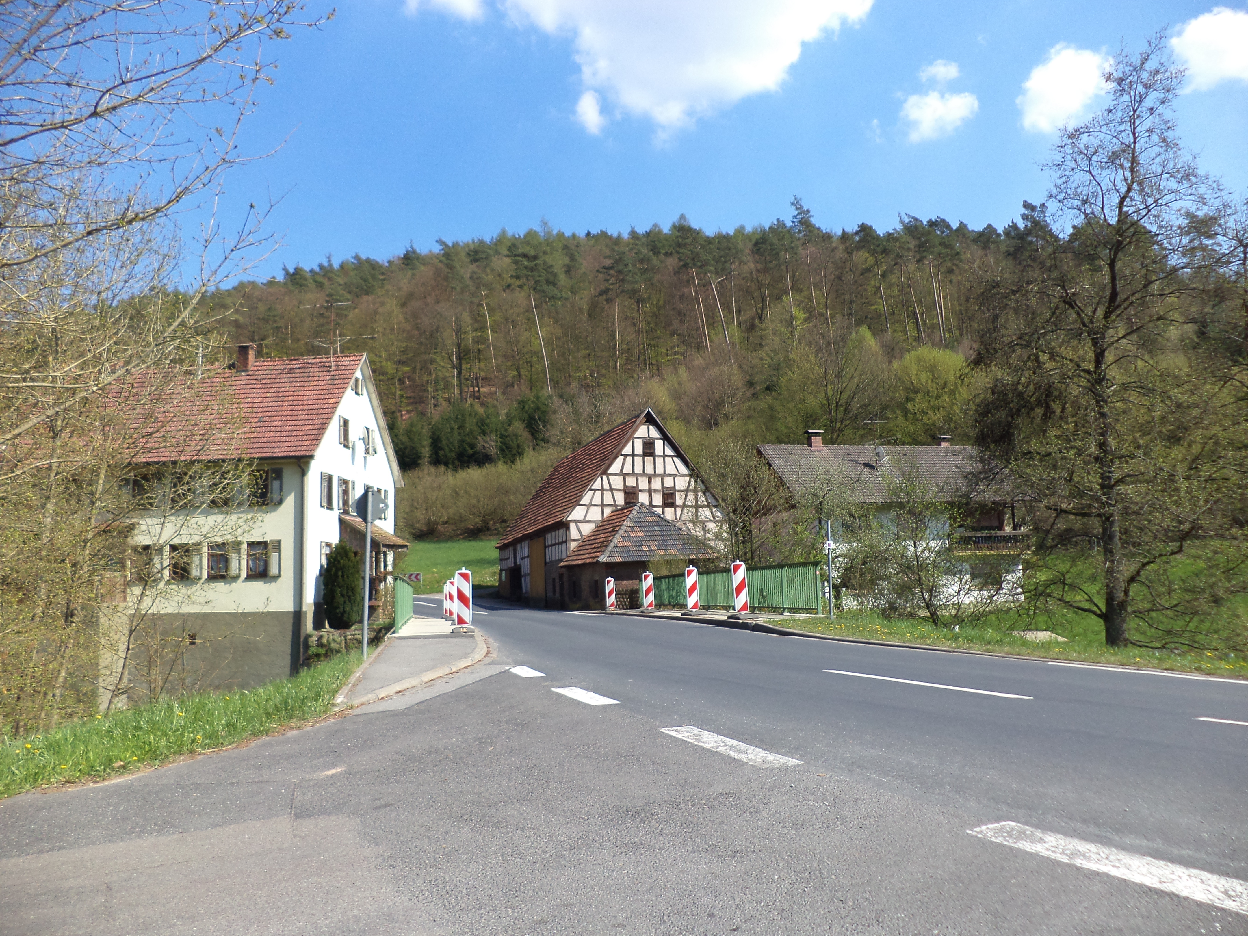 Die Schneidmühle im Mühlental (Haseltal) bei Hasloch